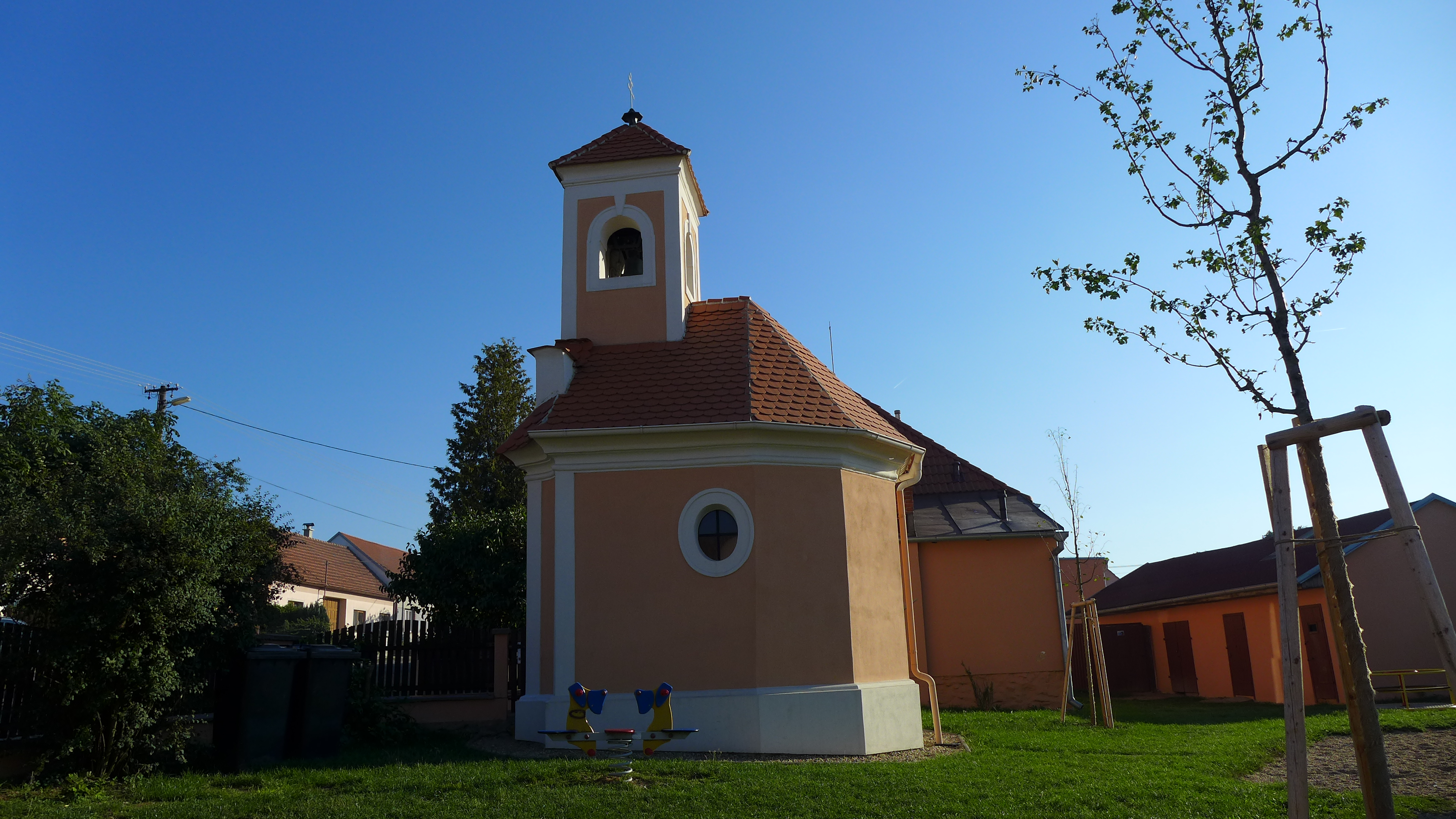 Kaple svatého Jana Nepomuckého, v obci, Ctidružice.